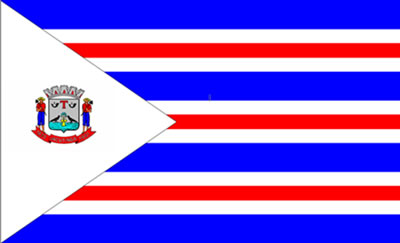 Bandeira de Jacutinga